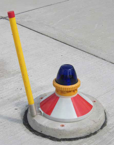 Luz de taxiway